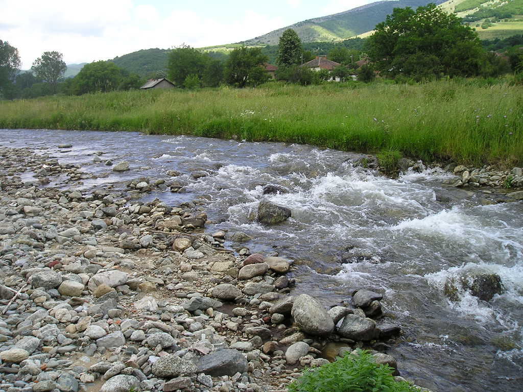 Бърза част от река Чупренска при село Търговище